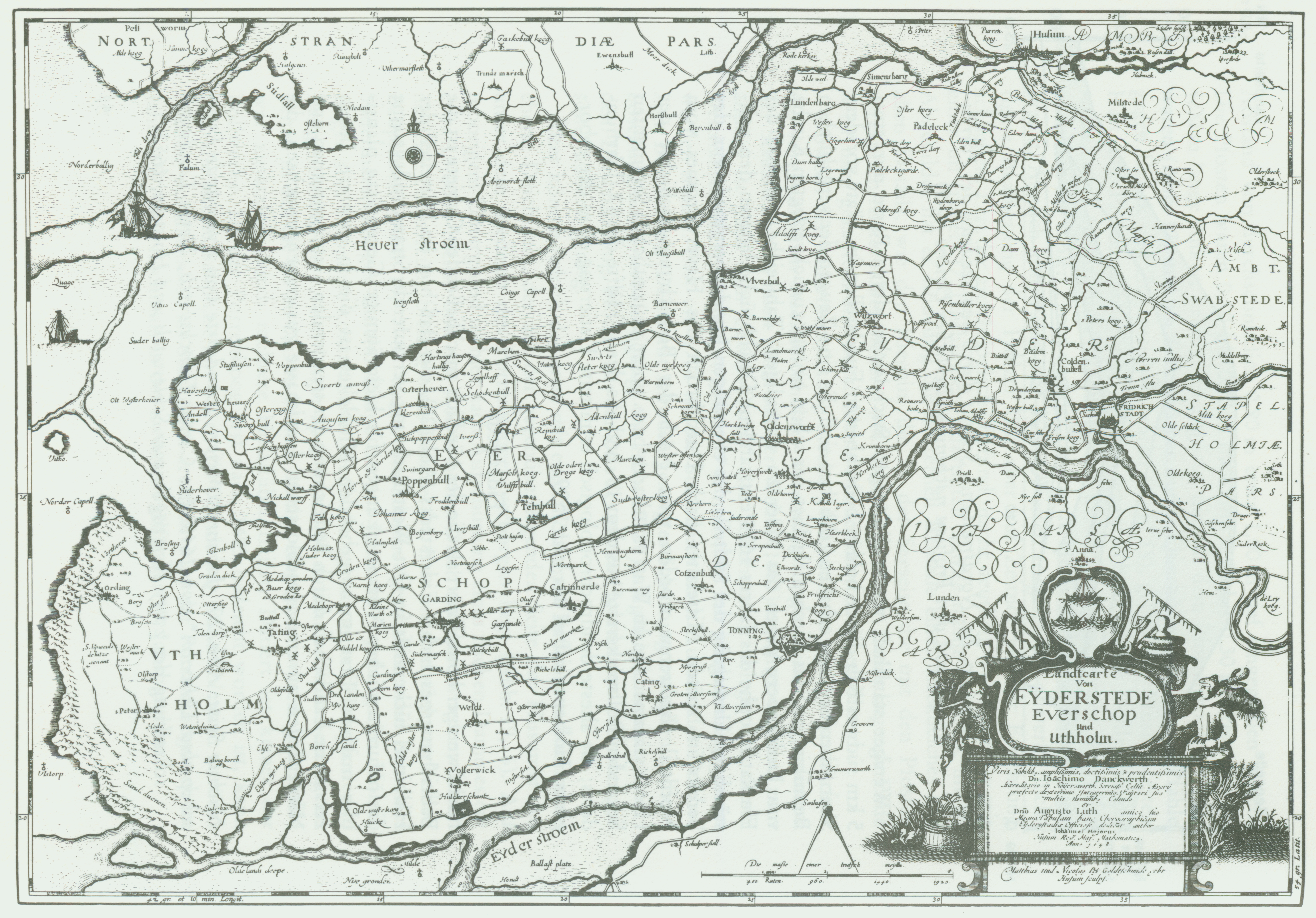 Johannes Meyer: "Landcarte von Eyderstede Eveschop un Uthholm"1648 In Caspar danckwerth"Newe Landesbeschreibung der zwey Herzogthümer SCHLESWICH UND HOLSTEIN" 1652